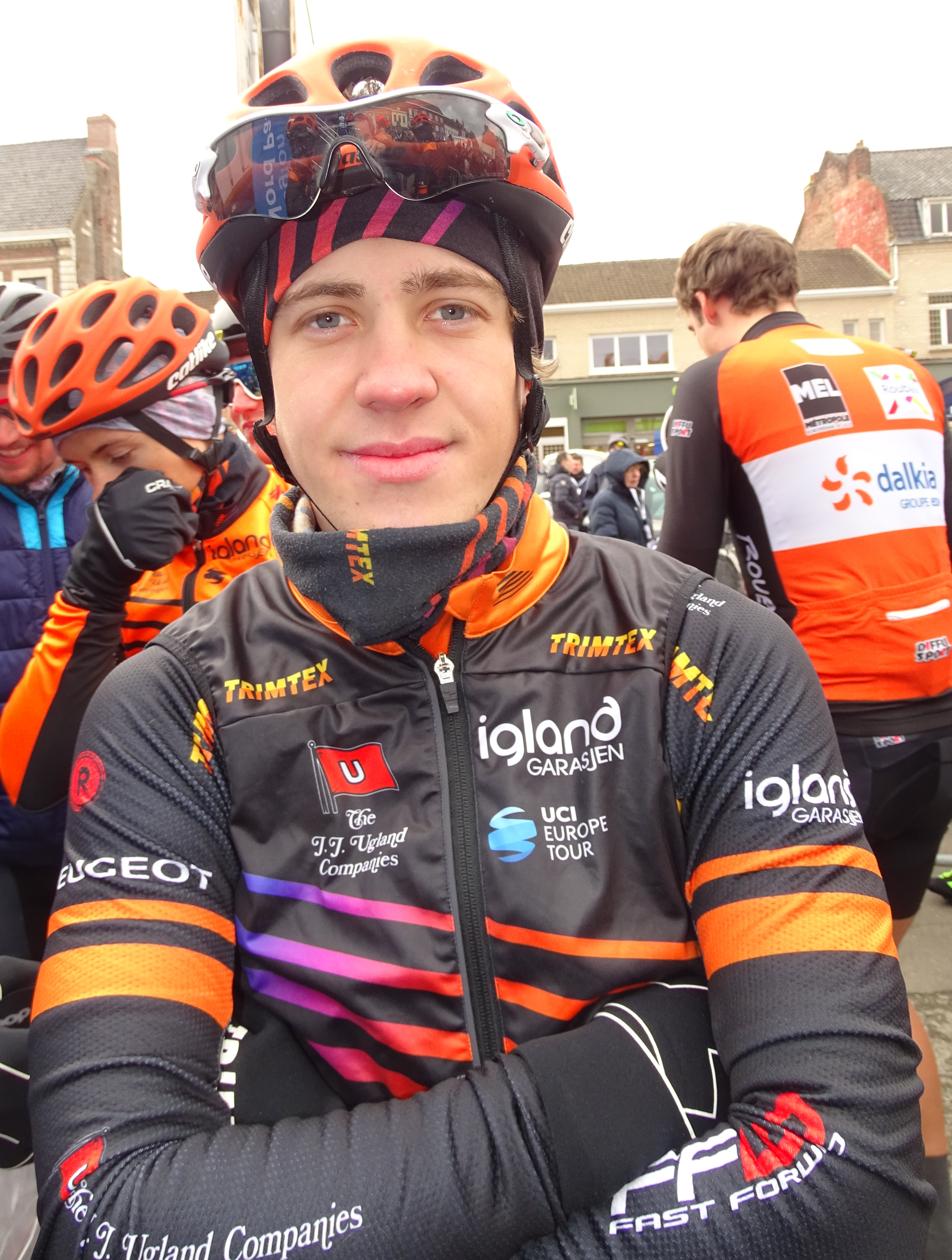 Reportage réalisé le dimanche 6 mars à l'occasion du départ et de l'arrivée du Grand Prix de Lillers-Souvenir Bruno Comini 2016 à Lillers, Pas-de-Calais, Nord-Pas-de-Calais, France.